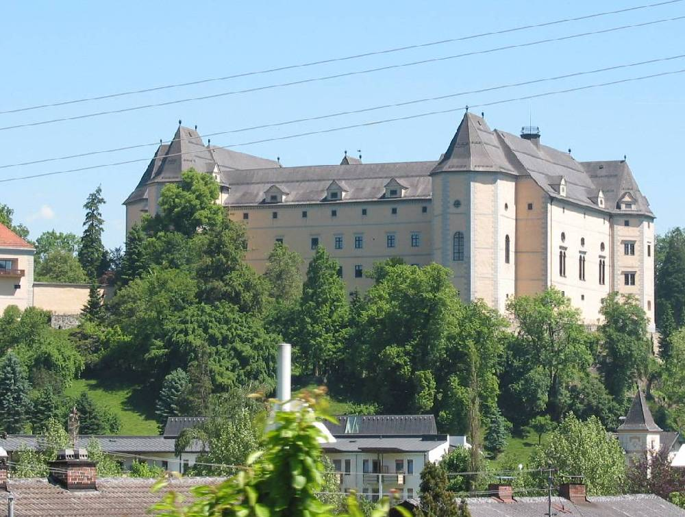 Schloss Greinburg 27.5.2005 Eigenes FotoRomână: Cetatea GreinBurg